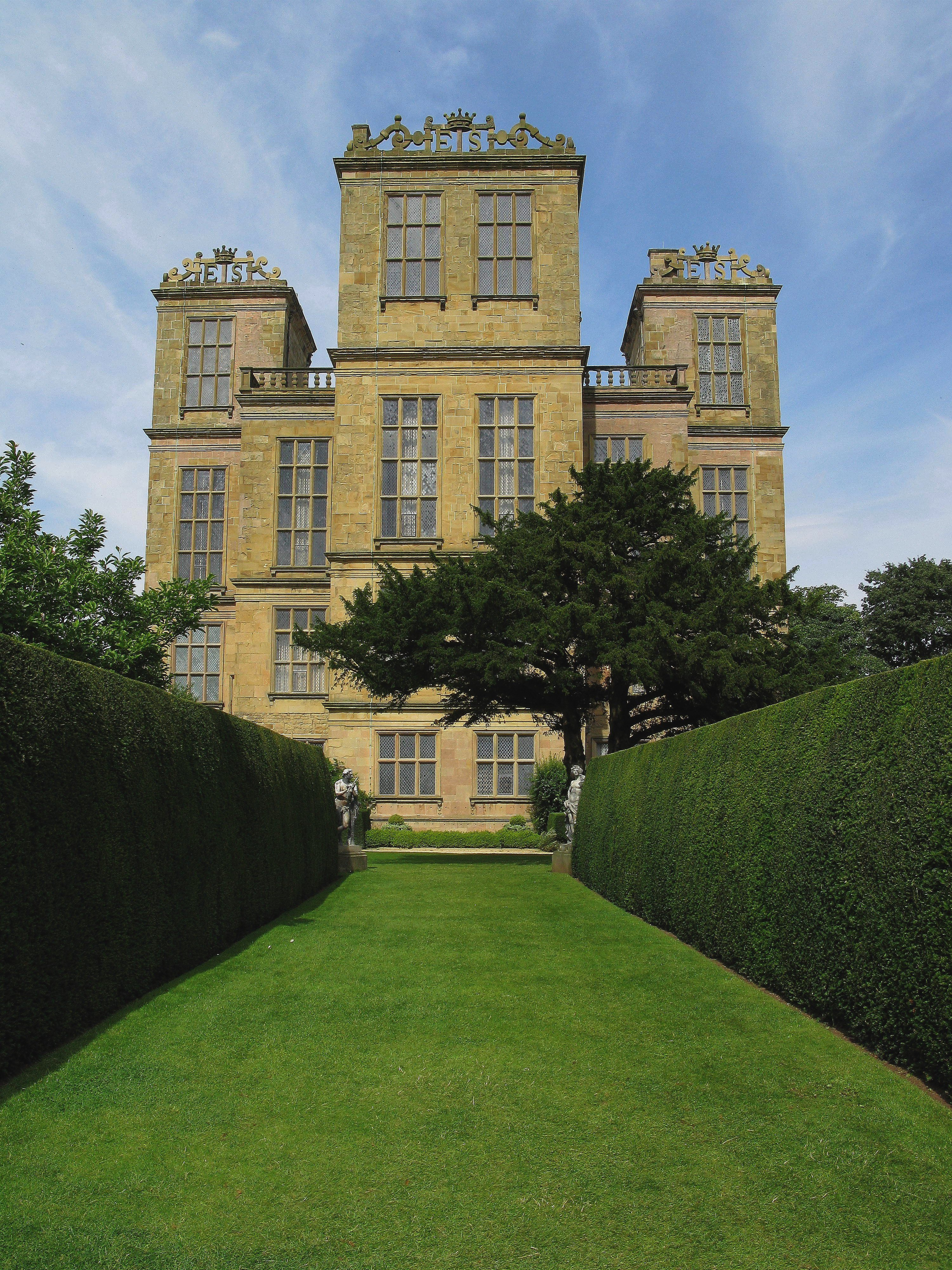 Hardwick Hall